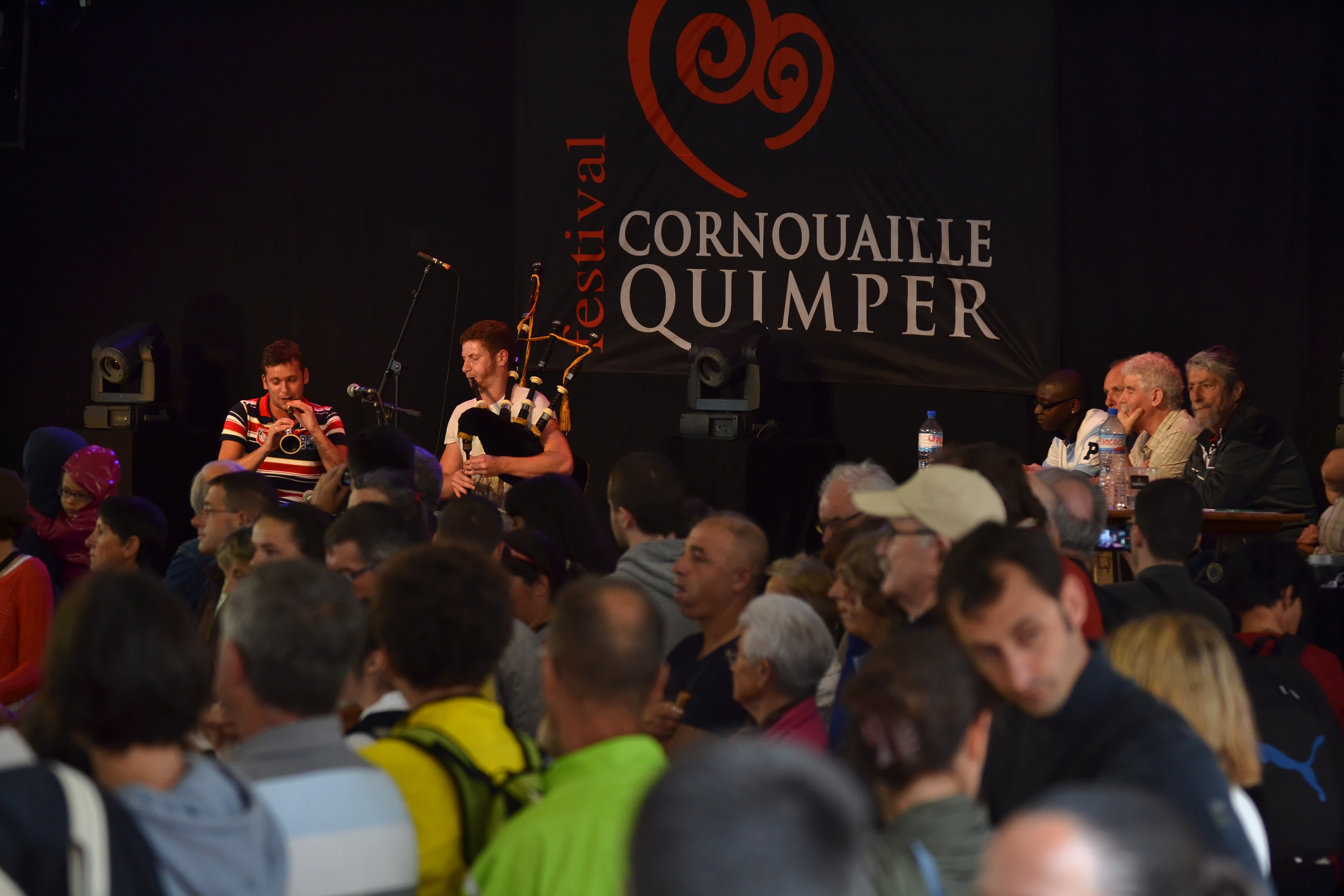 Trophée de la Plume de Paon le samedi 27 juillet 2013 à l'espace Saint-Corentin lors du festival de Cornouaille, avec notamment dans le jury Tangi Josset, champion à la bombarde l'année passée, et Erwan Ropars, le « Grand Bleu » de la cornemuse.